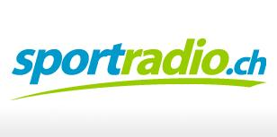 Sportradiologo